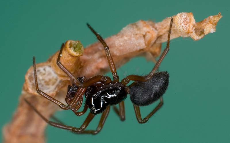 Erigone atra, adult male